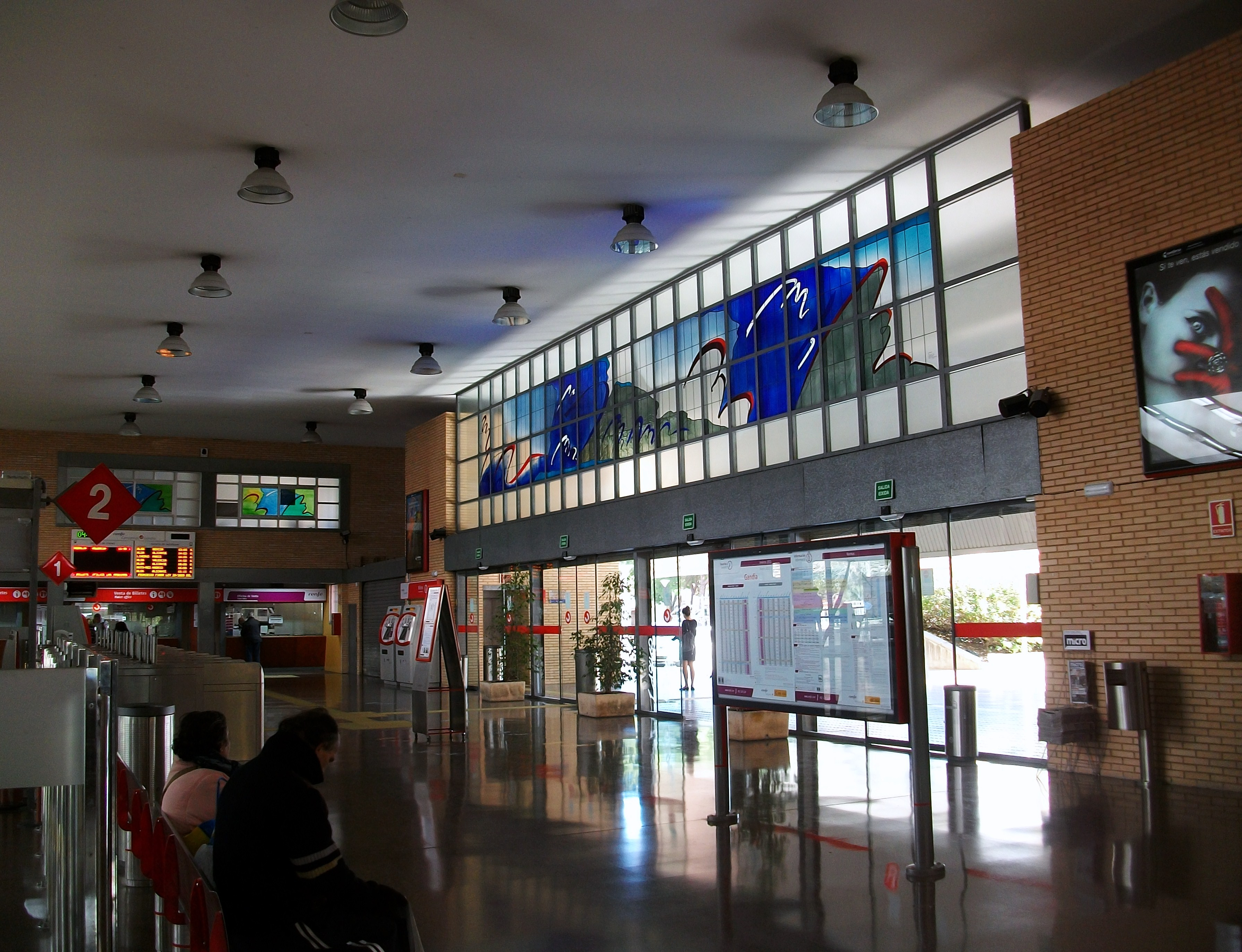 Interior de l'estació de tren de Gandia.